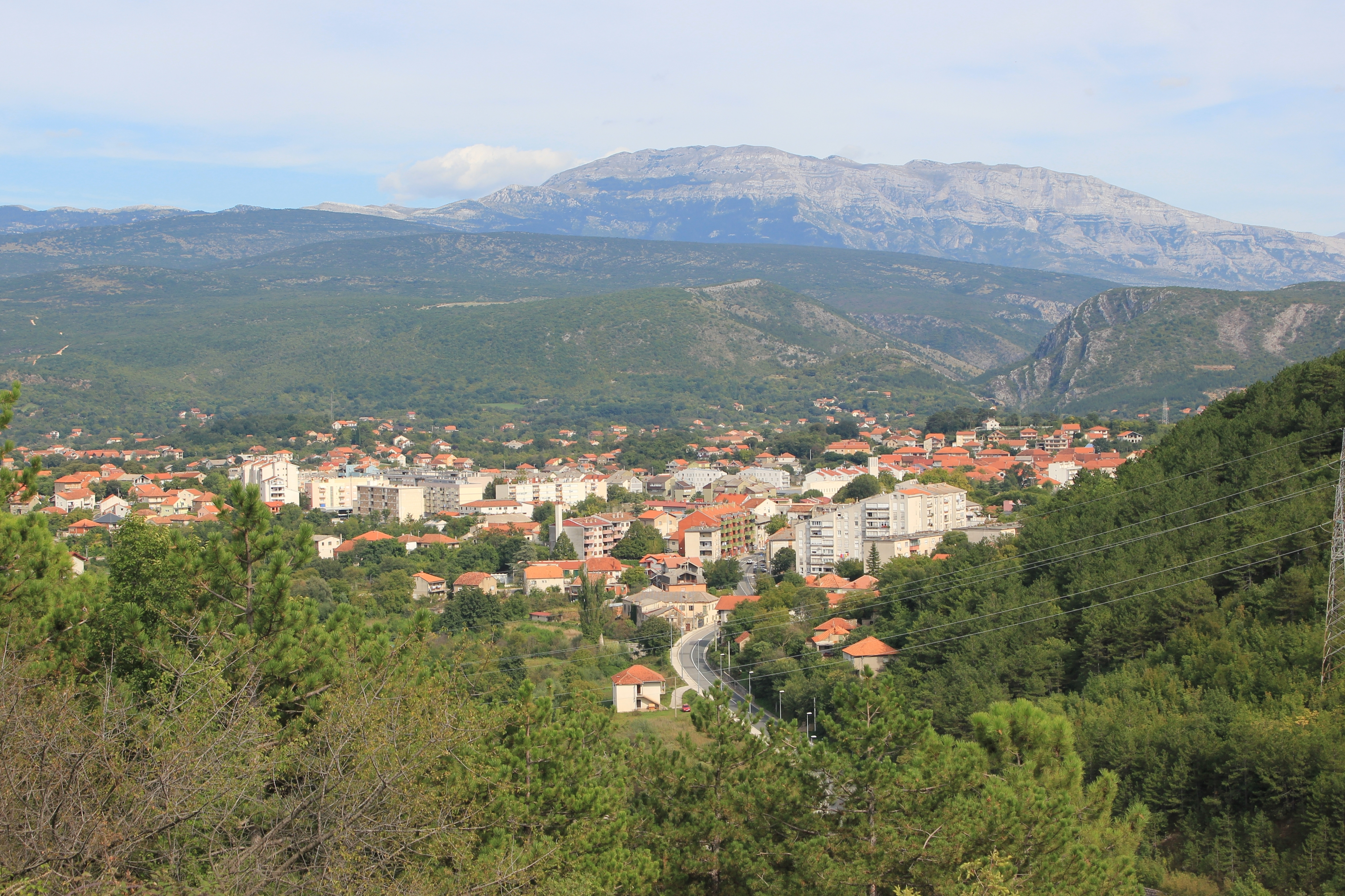 Blick über Knin auf die Dinara.